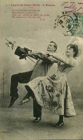 Lecon_de_Cake-Walk